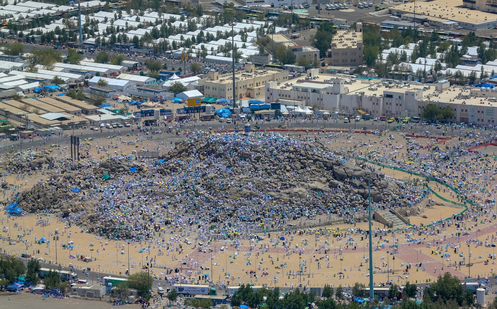 جبل الرحمة بمشعر عرفات بمكة المكرمة